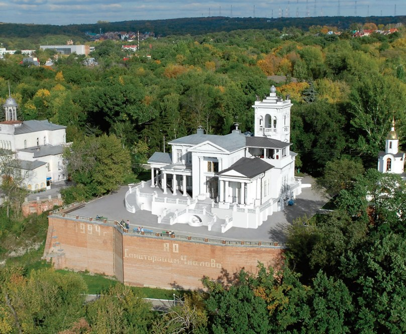 Санаторий Чкалова/Дача Соколова